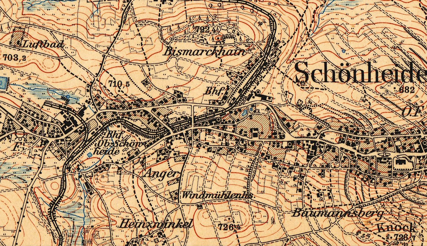 Schönheide im Erzgebirge: Ausschnitt aus einer 1:25.000-Karte aus der Zeit um den Ersten Weltkrieg. Die Ortsteile Anger, Baumannsberg und Heinzwinkel sind bezeichnet, der Ortsteil Fuchswinkel nicht. Im Jahr 1916 erschien diese Karte im Maßstab 1:25.000 (Meßtischblatt). Zur Datierung: Der Fuchsstein ist schon umbenannt in „Bismarckhain“, dies geschah im Jahr 1915. Der „Naturheilgarten“ wird in der Karte als „Luftbad“ bezeichnet, die Naturheilbewegung bestand also bereits so lange, dass sie schon die Kartographen der Vermessungsverwaltung des Königsreichs Sachsen erreicht hat. Das Forsthaus auf der Oberen Straße wird noch als „O. F.“ bezeichnet, dies ist die Abkürzung für Oberförsterei. In Oberschönheide findet sich ein „F“ für eine Försterei.